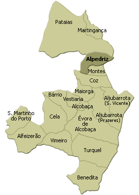 localisation de alpedriz sur la freguesia de alcobaça